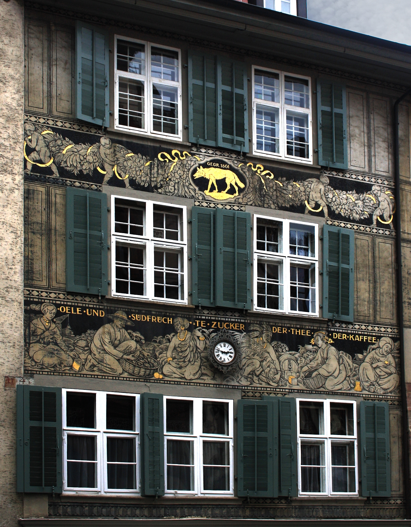 Bereits 1915 schmückte Burkhard Mangold die Haus Fassade «zum Wolf» am Spalenberg 22 in Basel, mit Szenen aus dem Kolonialhandel in Sgraffitotechnik. Die Fassade mit dem Wolf als Signet soll angeblich Hermann Hesse inspiriert haben bei der Namensgebung zu seinem Basler Roman "der Steppenwolf", als er des öfteren den Gemsberg herunter zu spazieren pflegte.